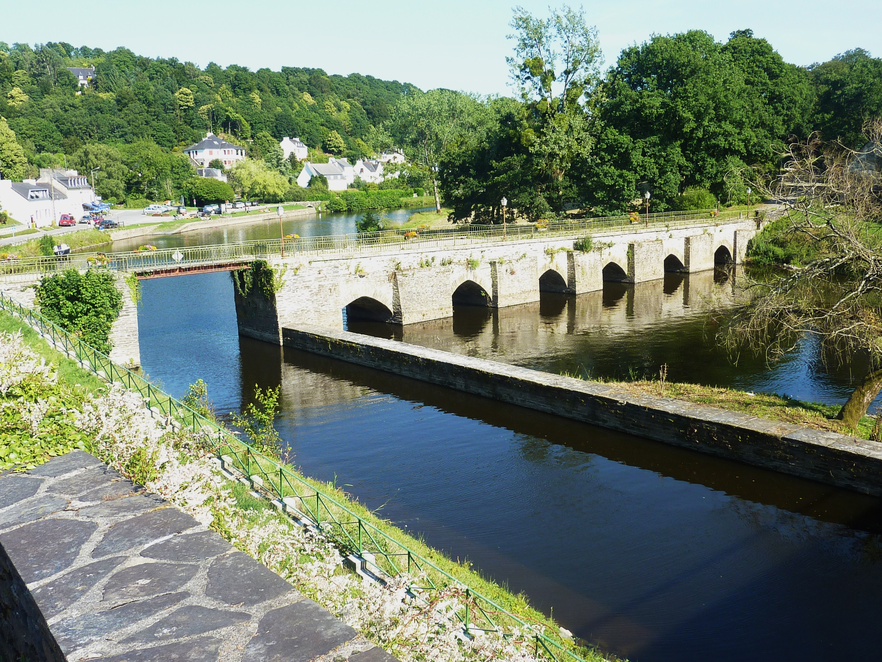 Châteauneuf-du-Faou : le Pont du Roy (réaménagé pour le canal de Nantes à Brest)